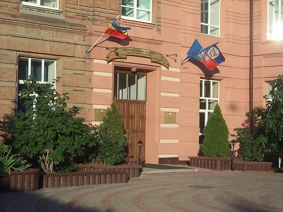 Вход в Культурно-выставочный центр «Донская казачья гвардия»